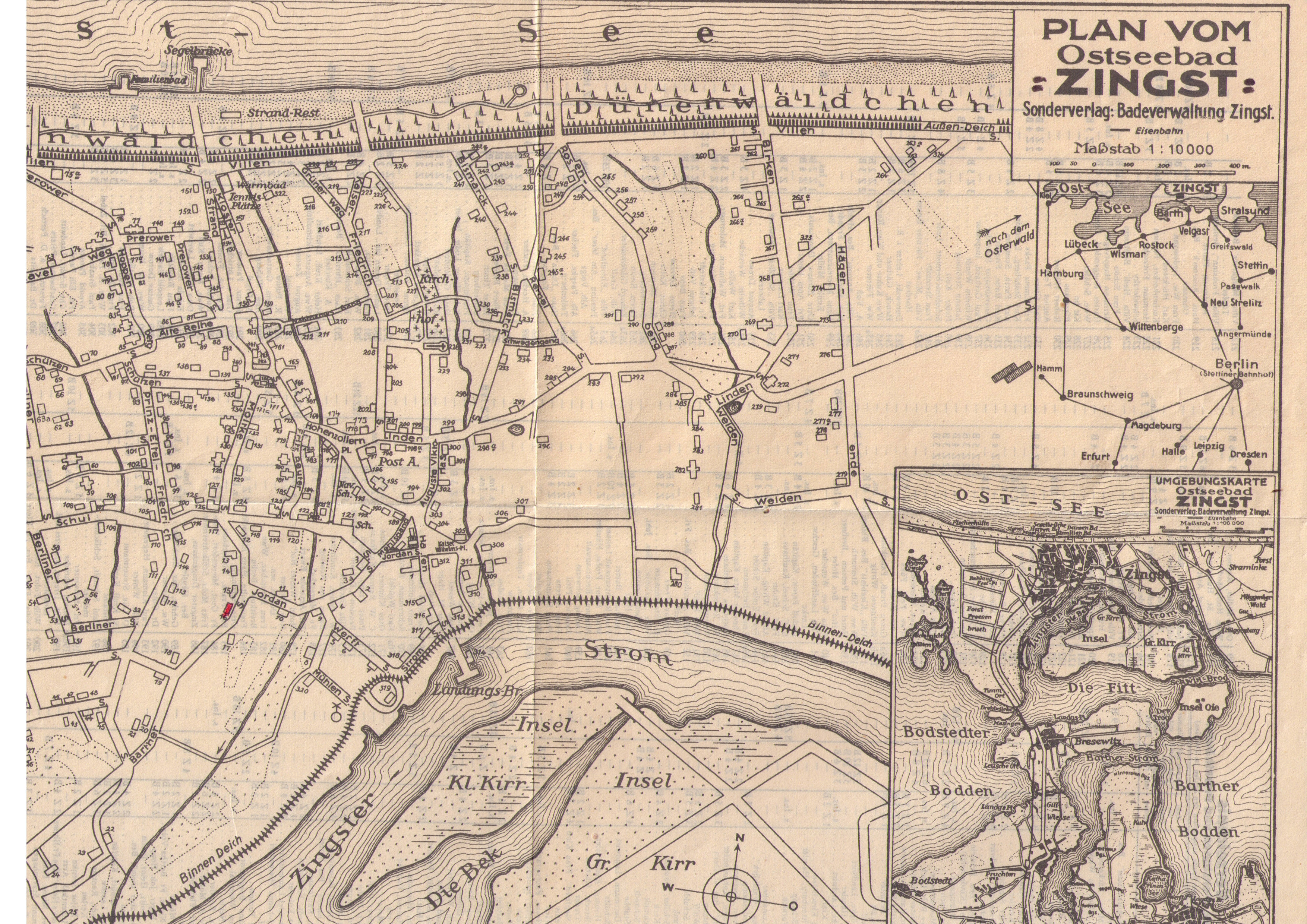 Stadtplan Zingst 1920